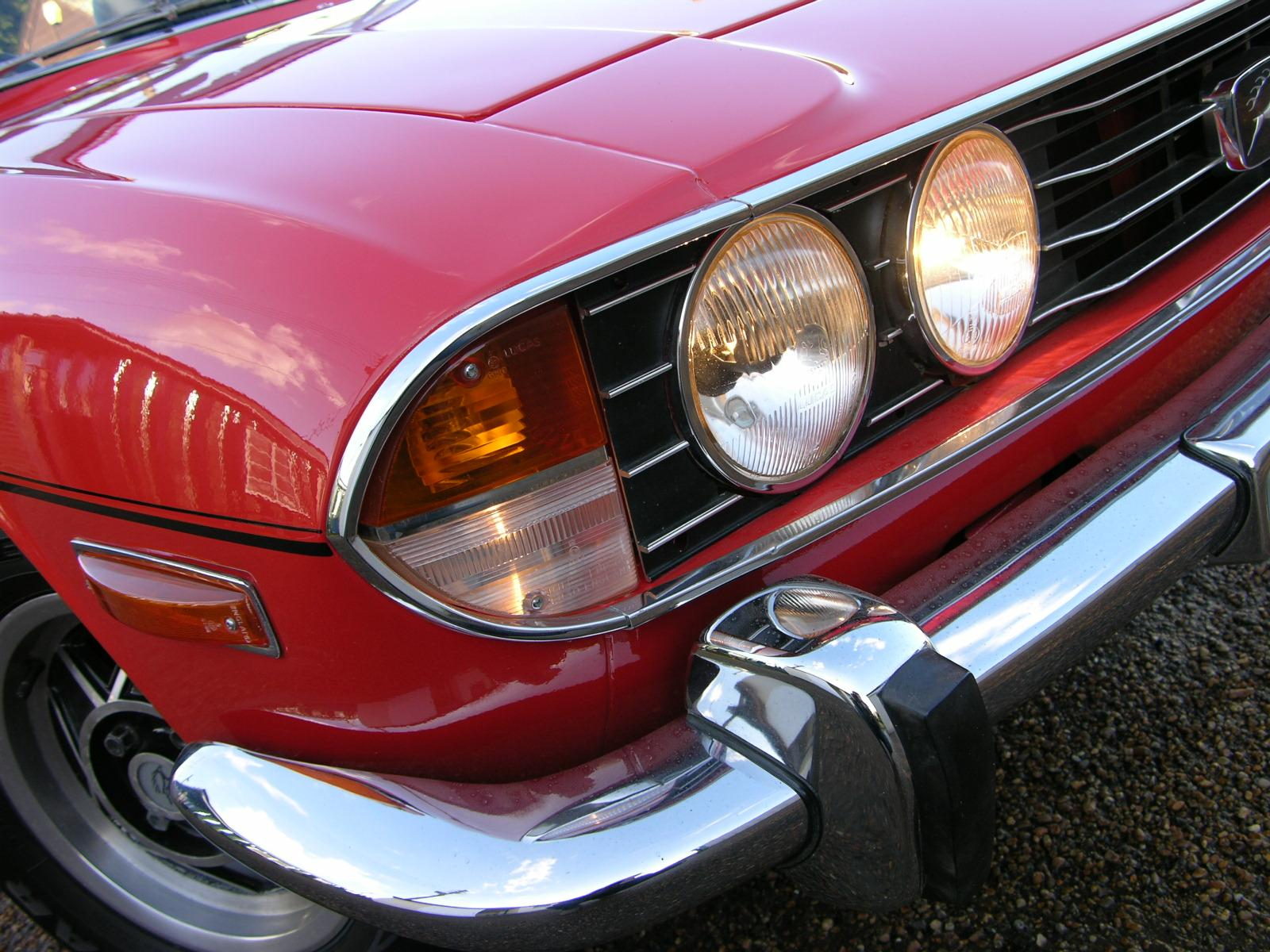 Triumph Stag 3.0 V8